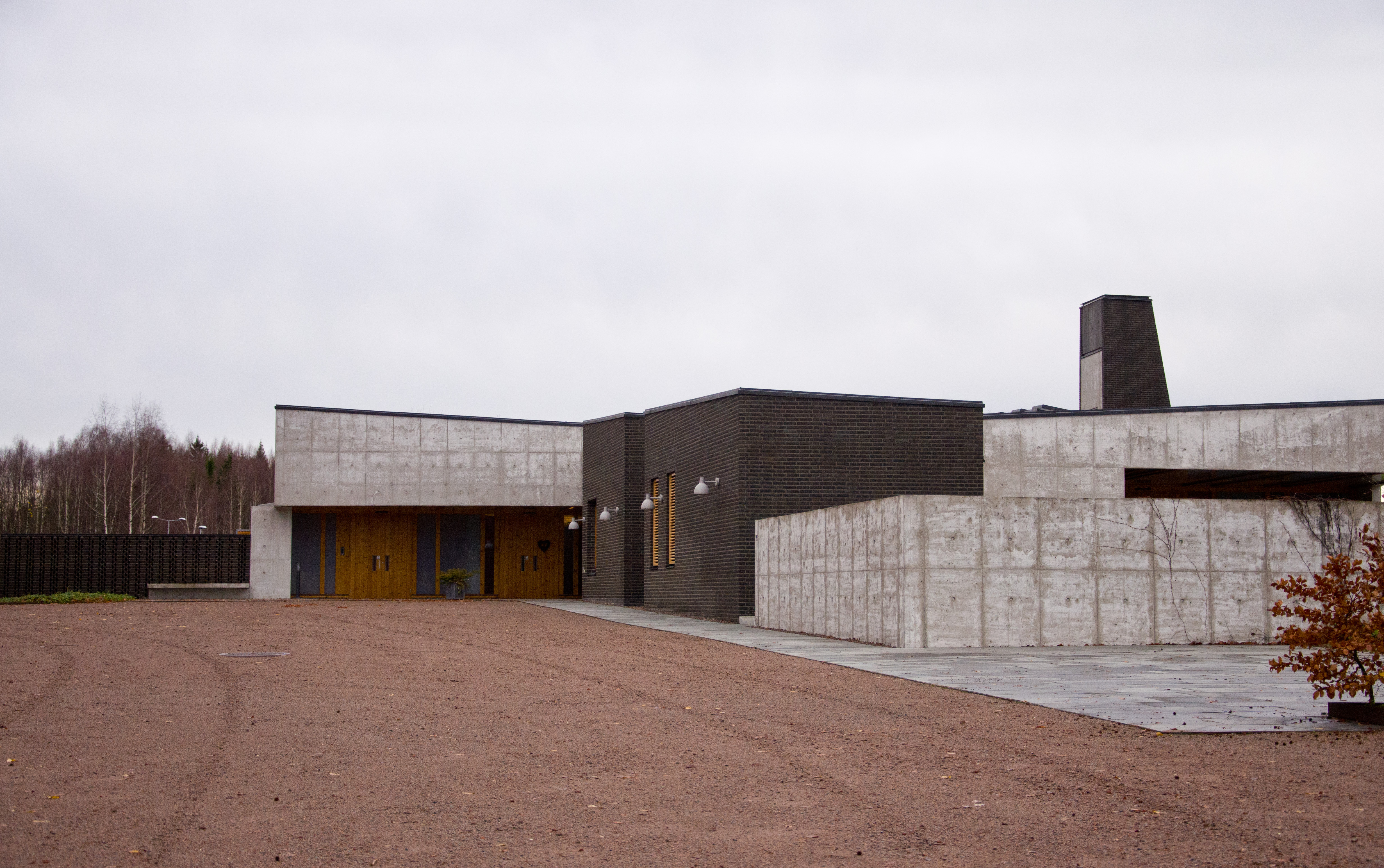 Vestfold Krematorium